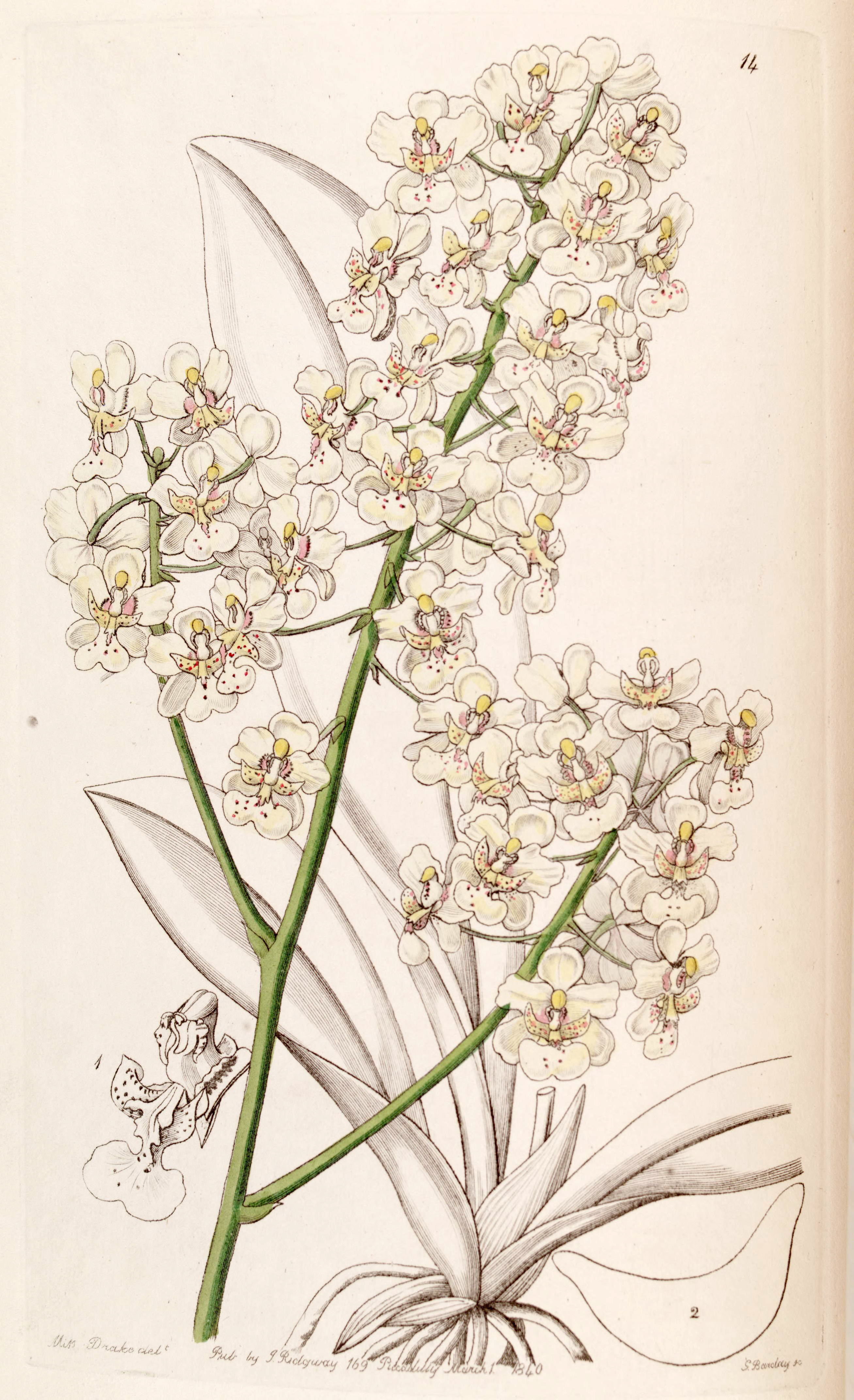 Trichocentrum stramineum (as syn. Oncidium stramineum)